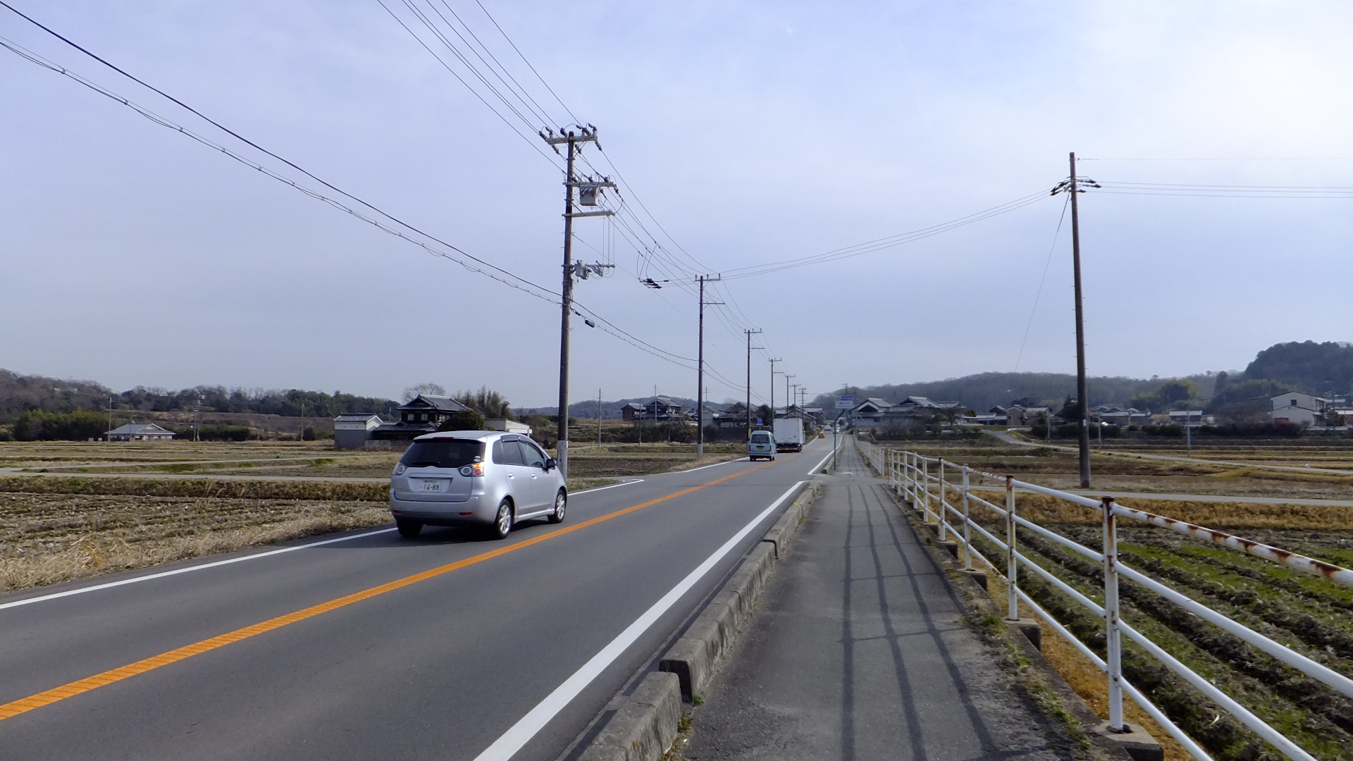 兵庫県三木市細川町細川中 兵庫県道20号加古川三田線